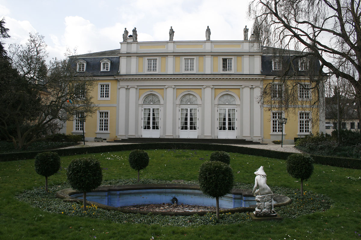 Die „Redoute“ im Bonner Stadtbezirk Bad Godesberg